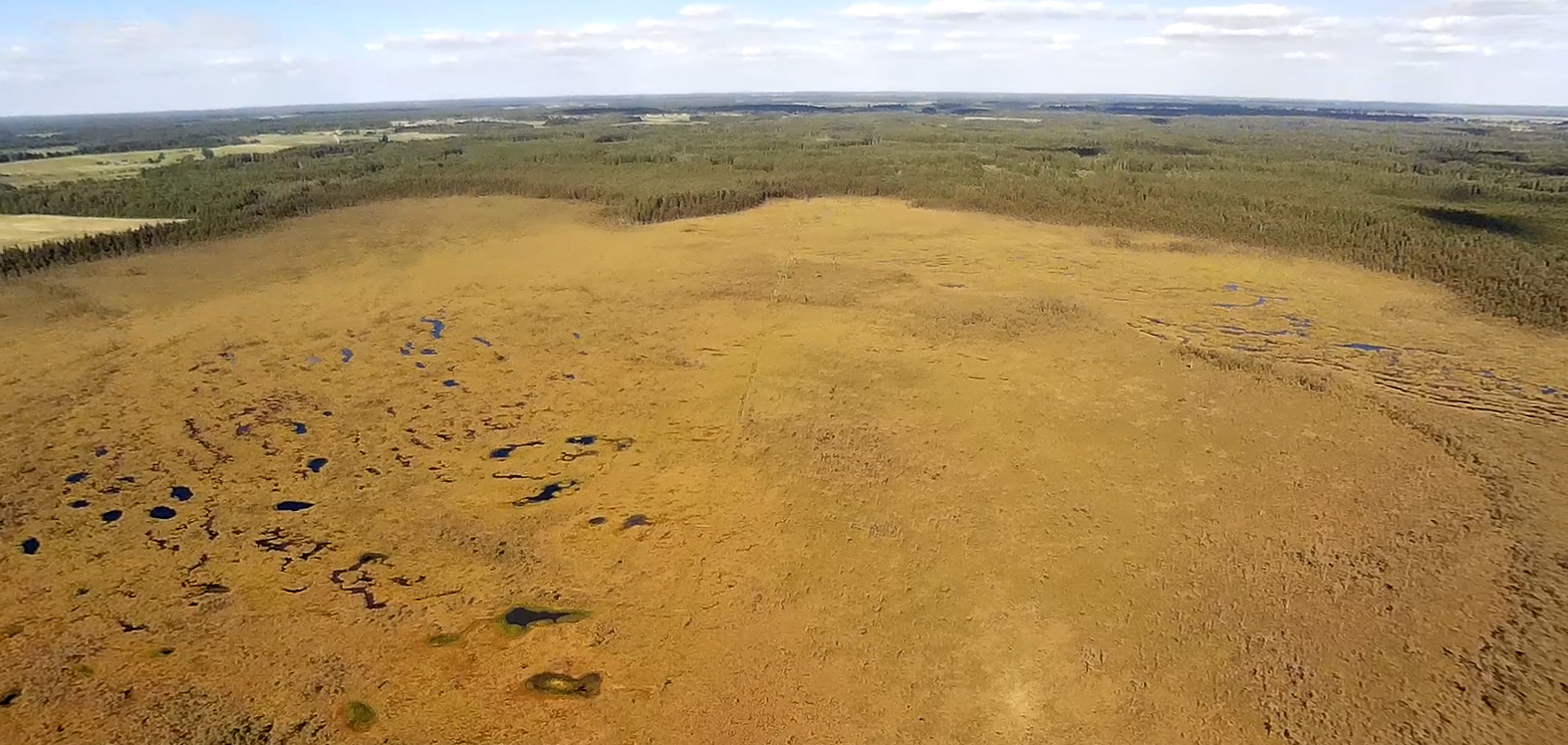 Aukštasis Tyras